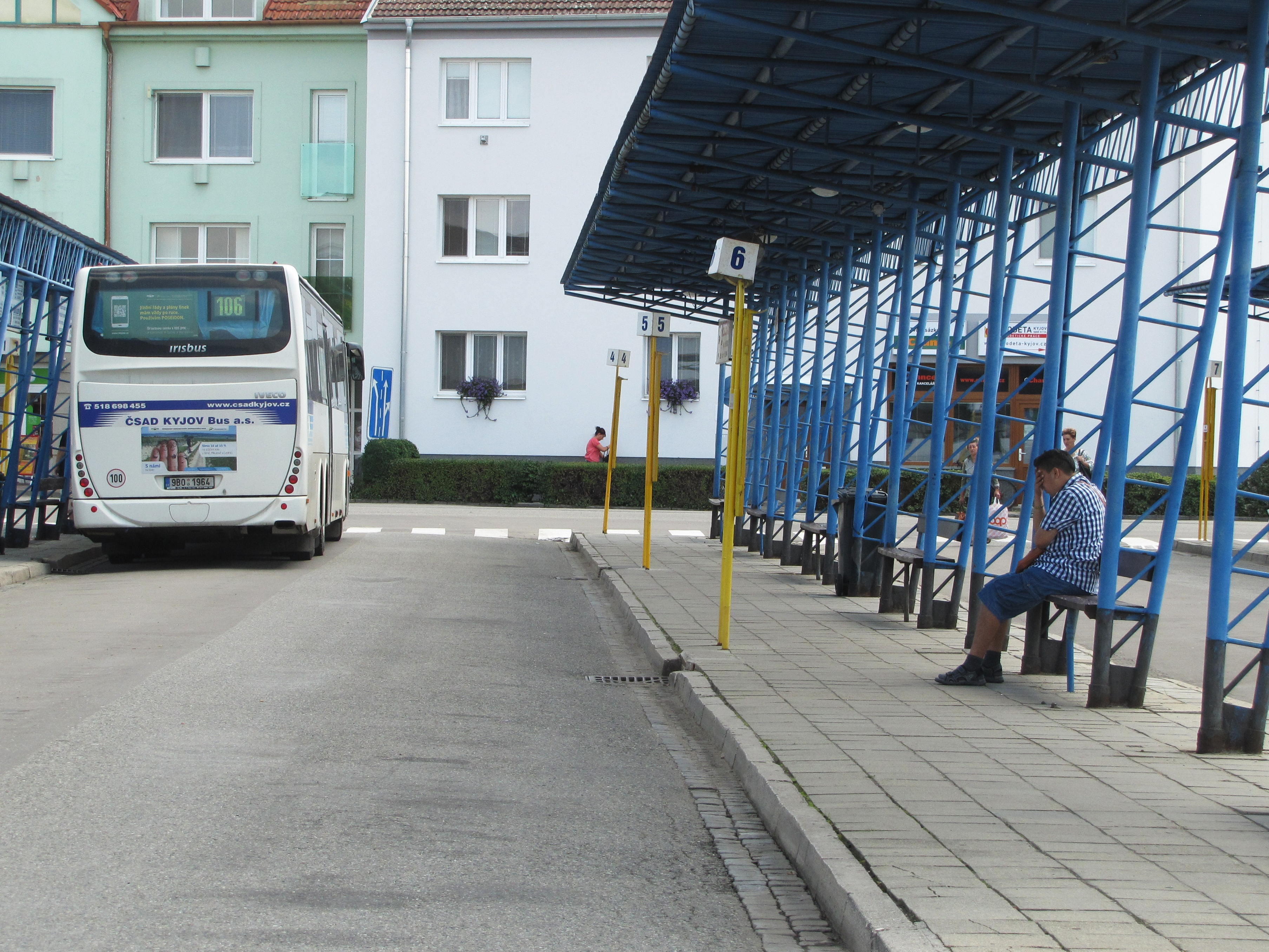 Autobusové nádraží v Kyjově